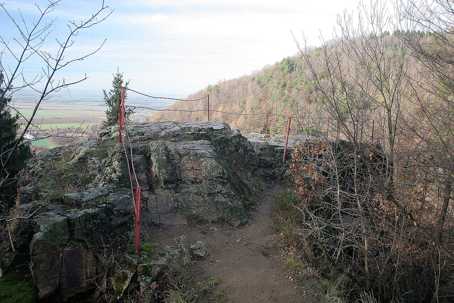 Vyhlídka Dívčí kámen nad Lovětínskou roklí u hradu Lichnice autor:Zp